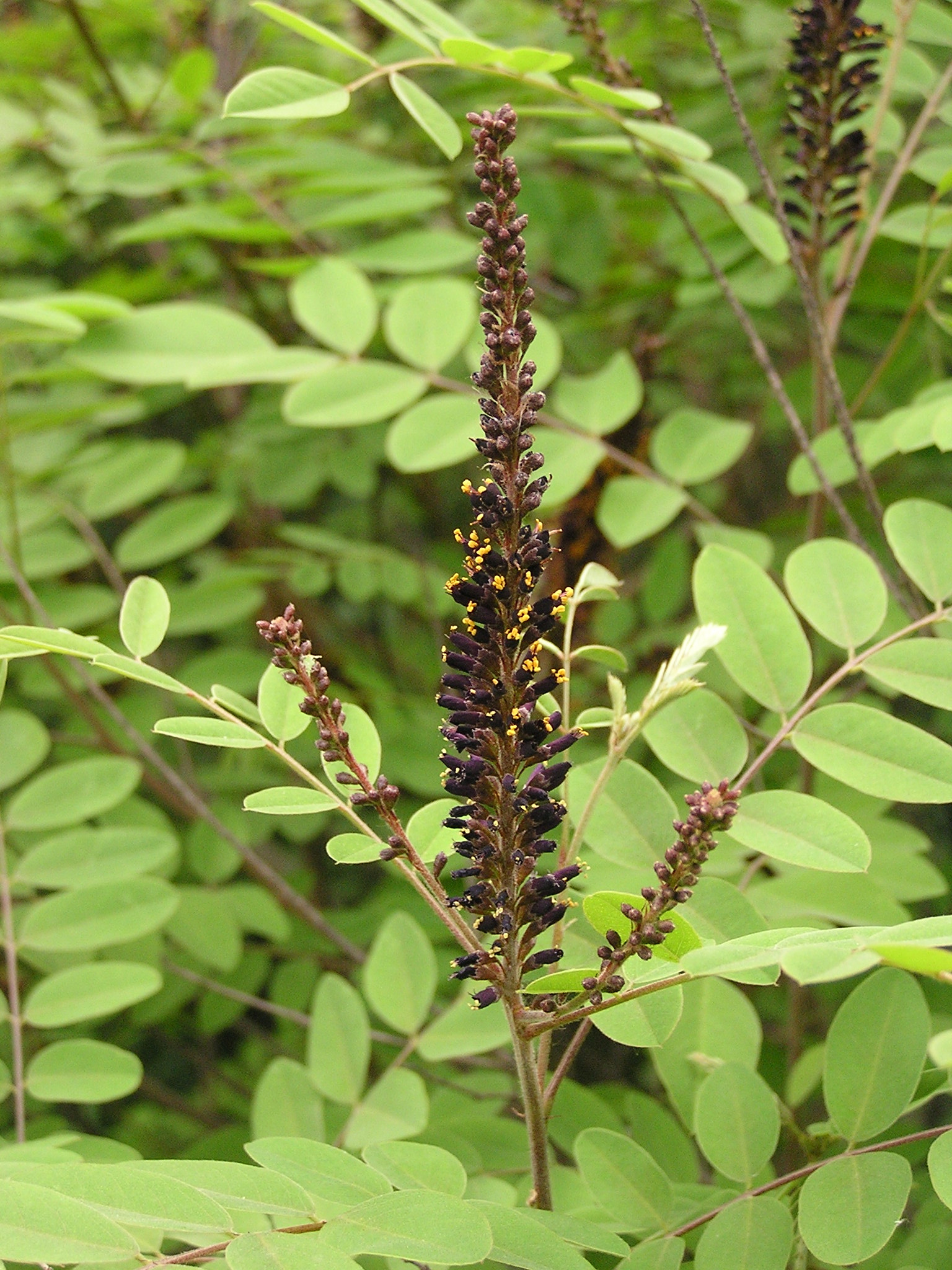 Растение